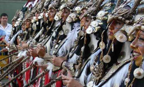 Foto de una "escuadra" de las Fistas de Muro del Alcoy.